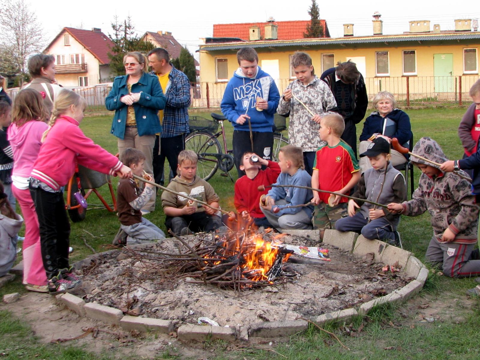 Wojcieszyce. Ognisko